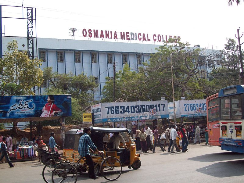 Osmania Medical College at Koti